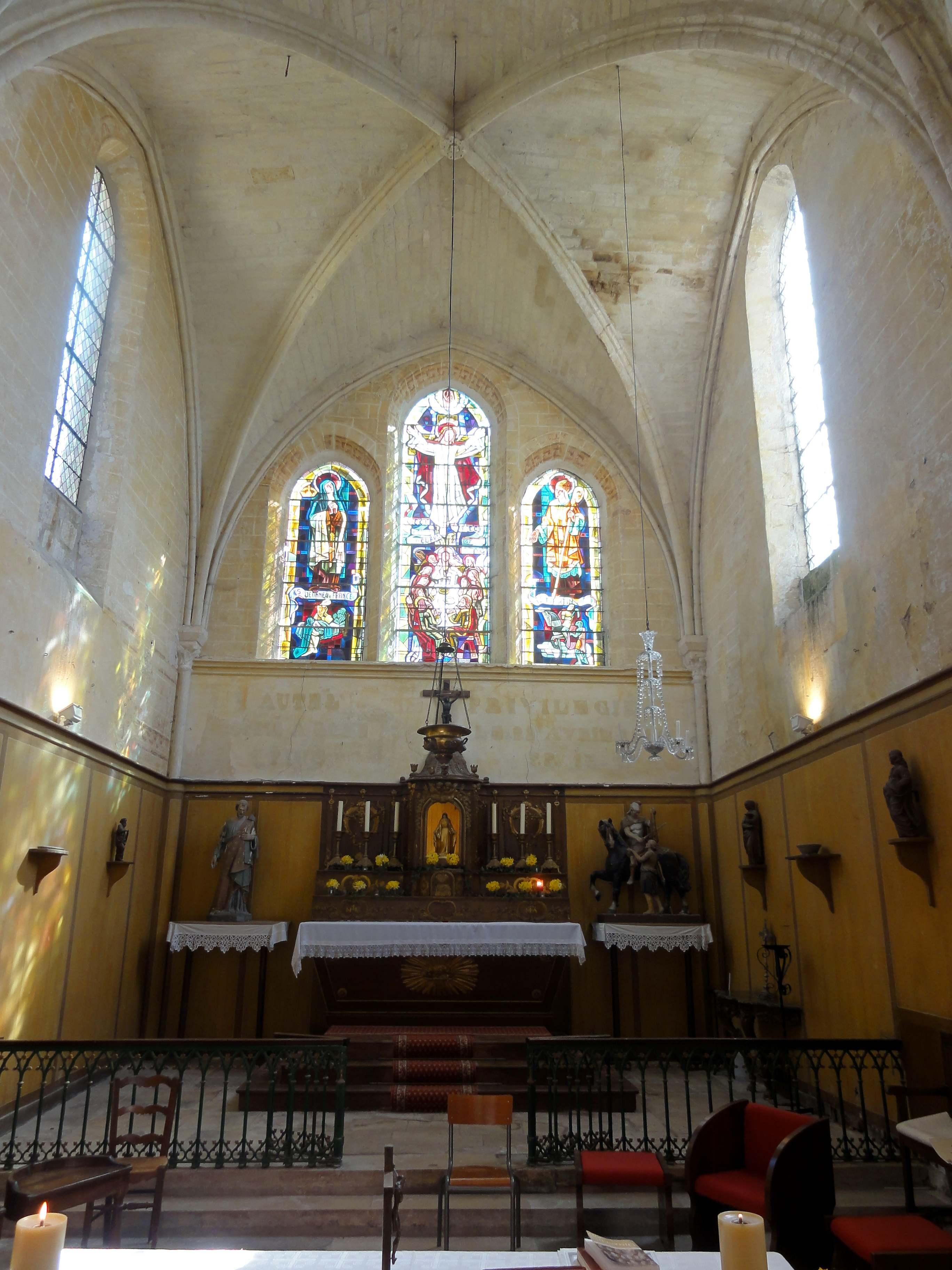 Intérieur de l'église (voir titre).